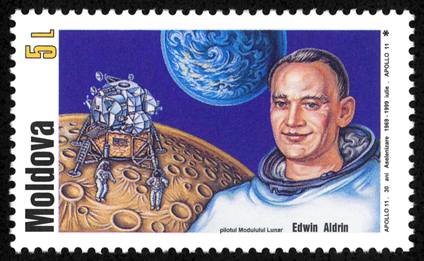 Timbru dedicat aniversării a 30 de ani de la aselenizarea echipajului american din 1969